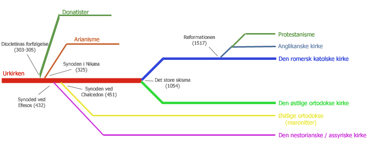 Historisk overblik over kristendommens udvikling. Forskellige fortolkninger af biblen og andre faktorer medførte igennem årtusinderne en opdeling i forskellige kristne retninger, men alle grene har rod i den tidlige ur-kirke.